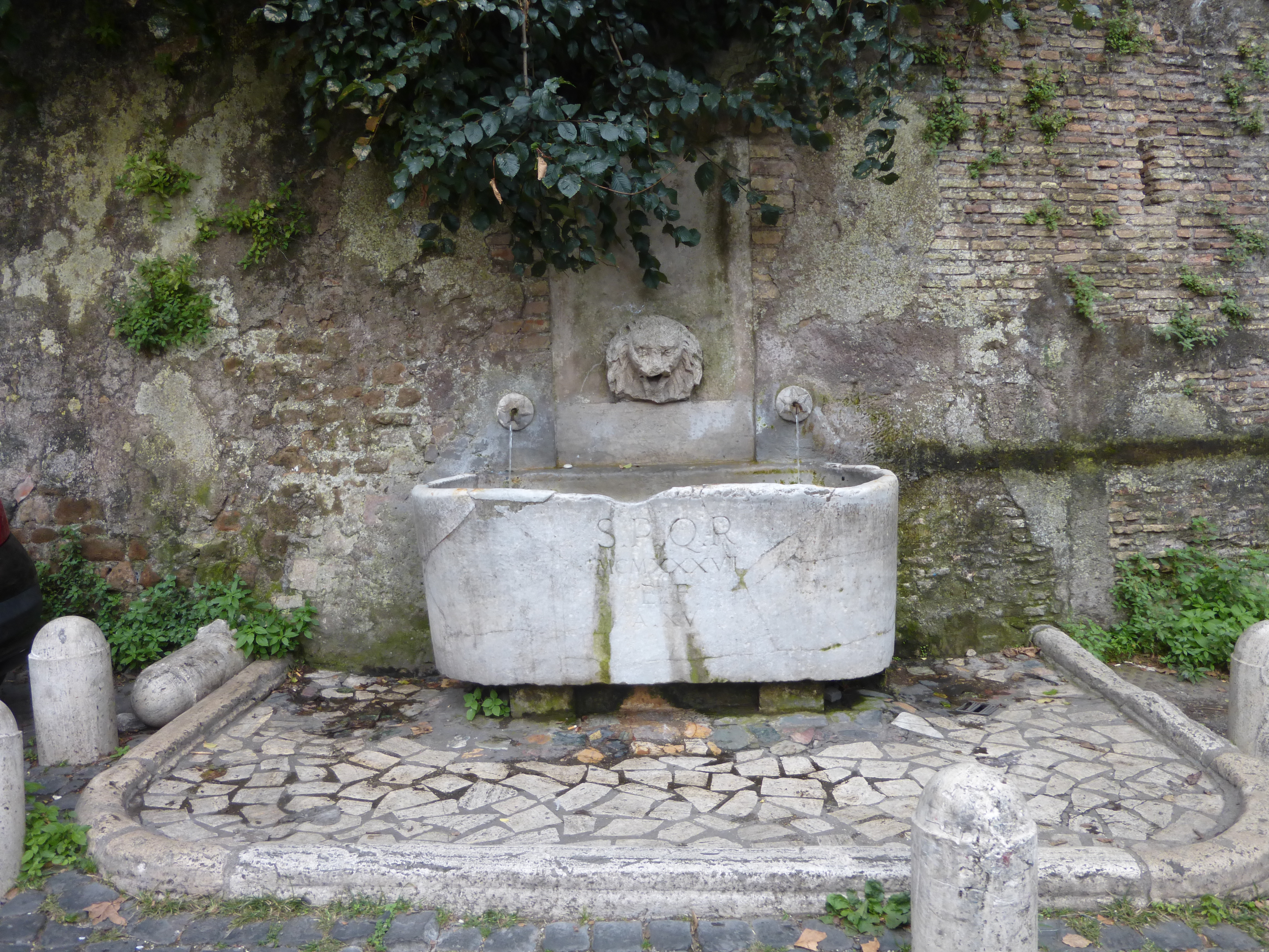 Roma, via Garibaldi. Fontanile ricavato da un sarcofago. Impianto datato 1937 (XVII EF)